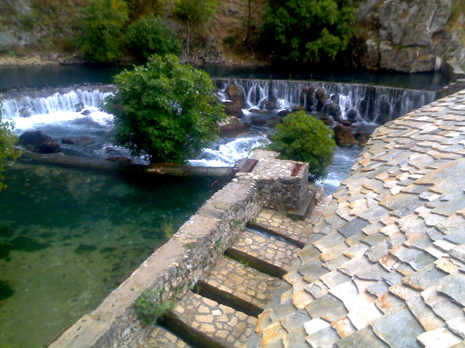 Takija surroundings